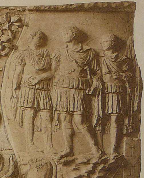 Detail de la colonne trajane, scène 10, droite